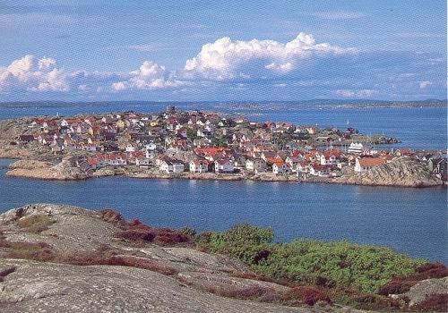 Vykort föreställande Källö-Knippla i Öckerö kommun, Bohuslän, Västra Götalands län, Sverige.